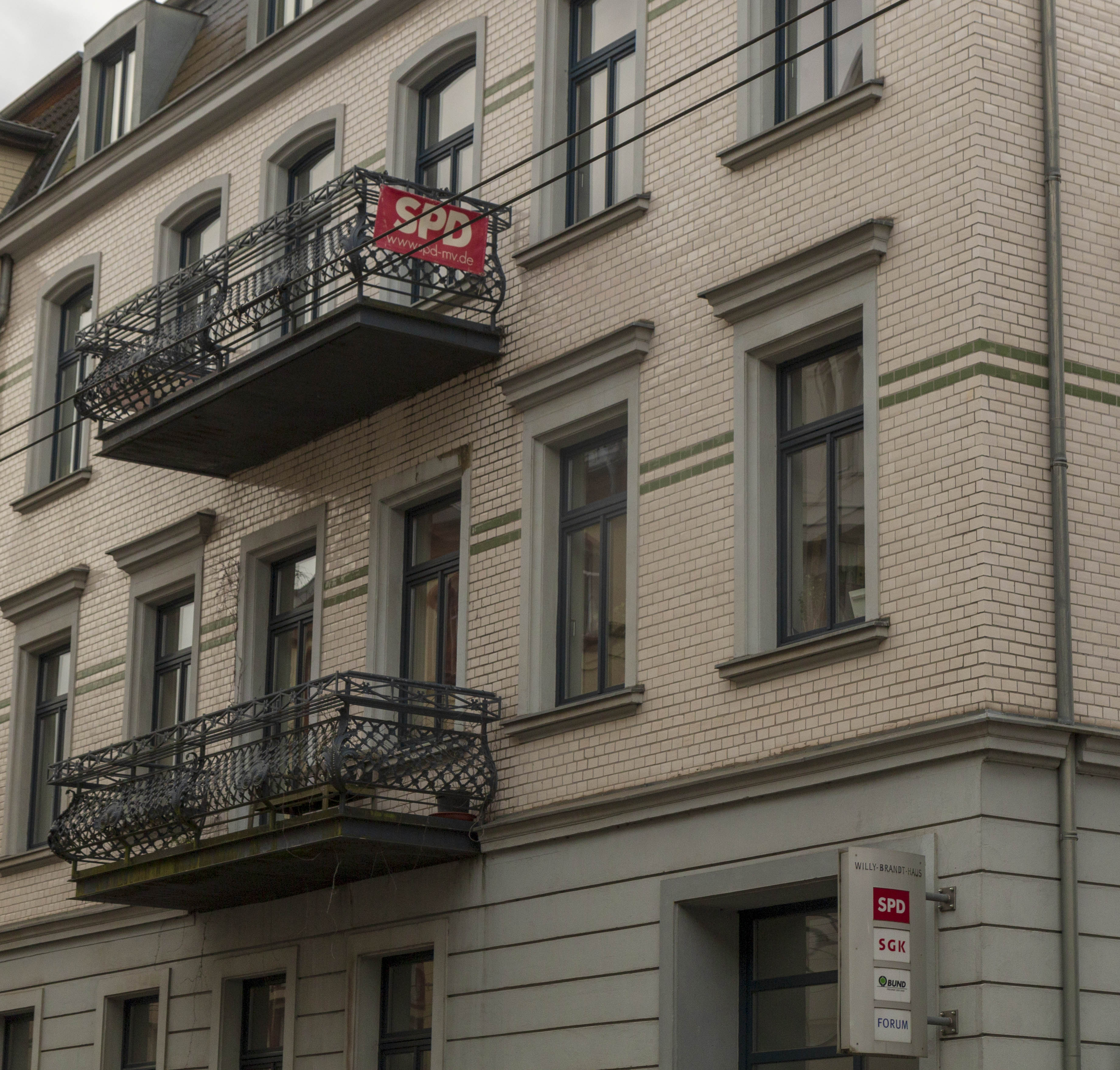 Abgeordnete des Landtages Mecklenburg-Vorpommern während einer Plenarsitzung Ende Januar 2020 in Schwerin.